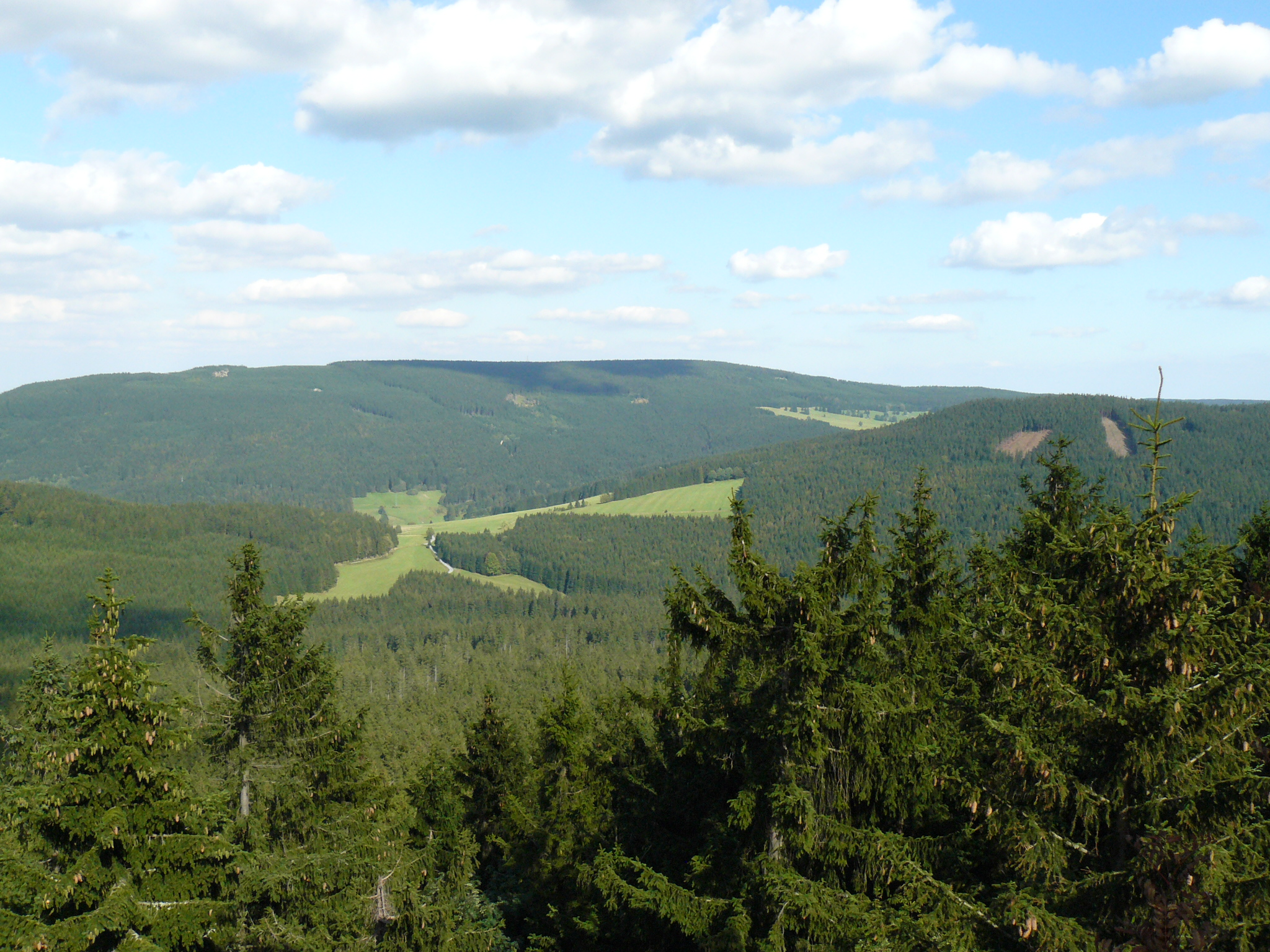 Pohled ze zříceniny hradu Koberštejn, Rejvíz, Jeseníky